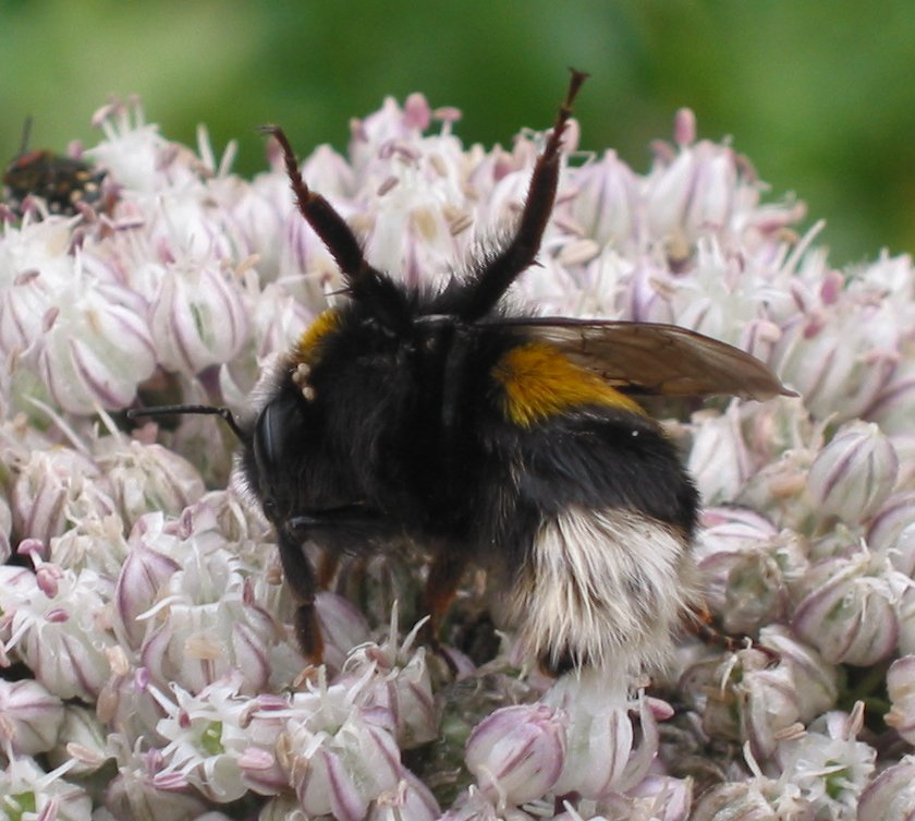 zelfgemaakte foto van Aardhommel in verdedigingshouding met mijt of luis op prei